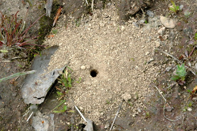 Andrena clarkella from Commanster, Belgian High Ardennes .